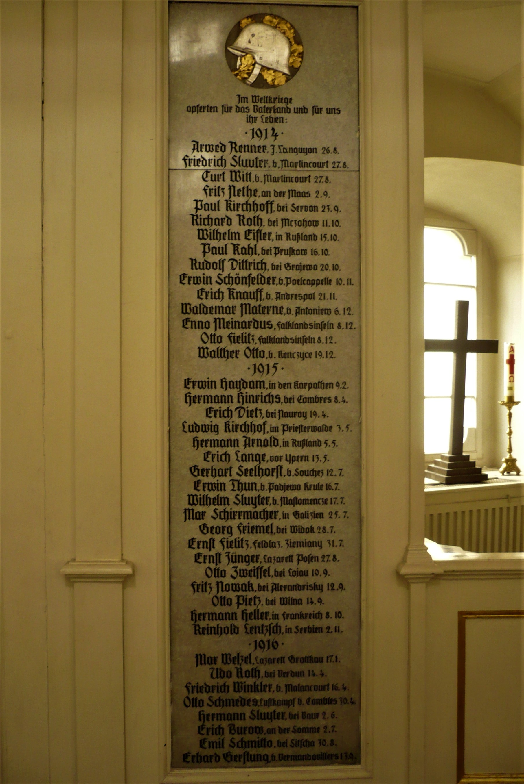 Kościół Opatrzności Bożej we Wrocławiu